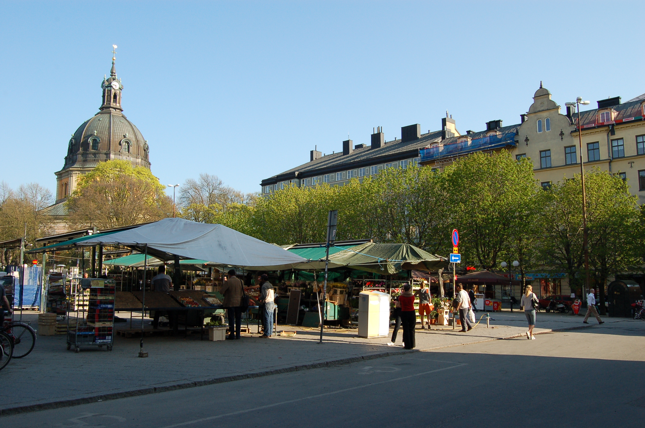 Östermalmstorg i Stockholm mot sydost från Nybrogatan.